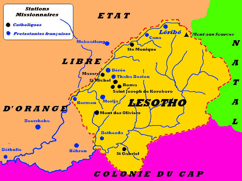 Les stations missionnaires catholiques et protestantes françaises du Lesotho et des environs.